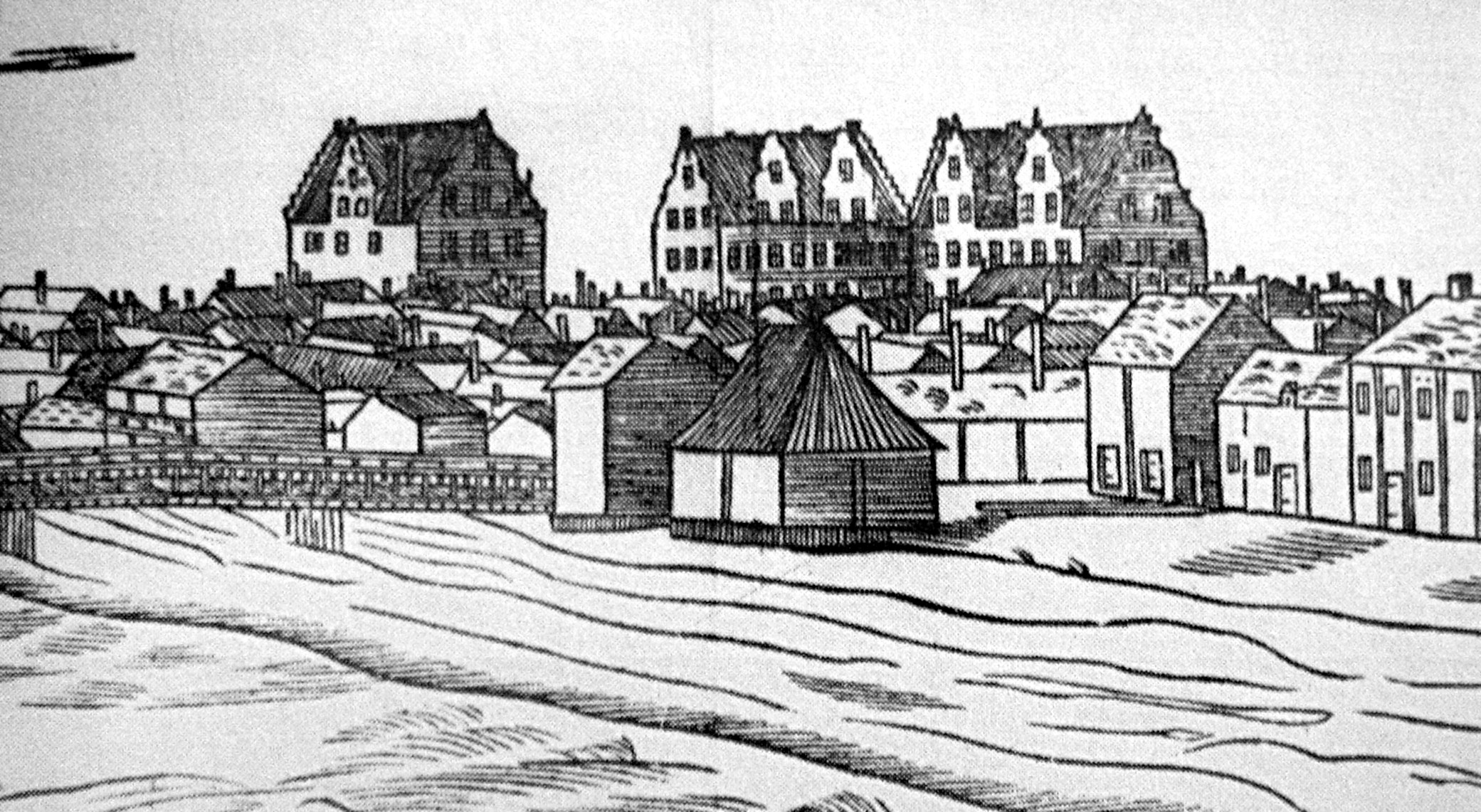 Stora Torget i Uppsala 1679. Ur Olof Rudbecks Atlanticas Atlasband